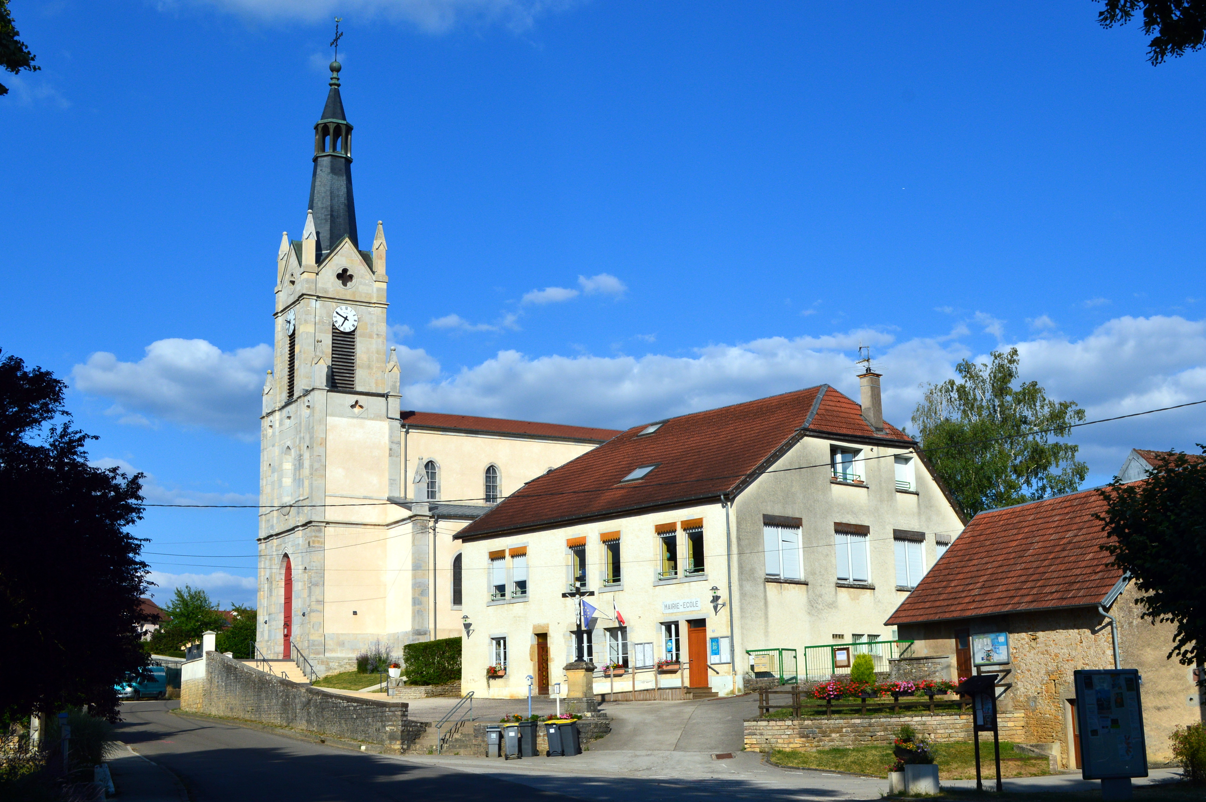 L'église Saint-Martin et la mairie-école de Noironte, vues depuis la place du village, durant l'été 2018.